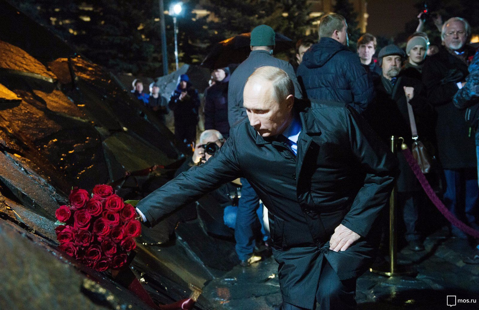 Открытие мемориала «Стена скорби»